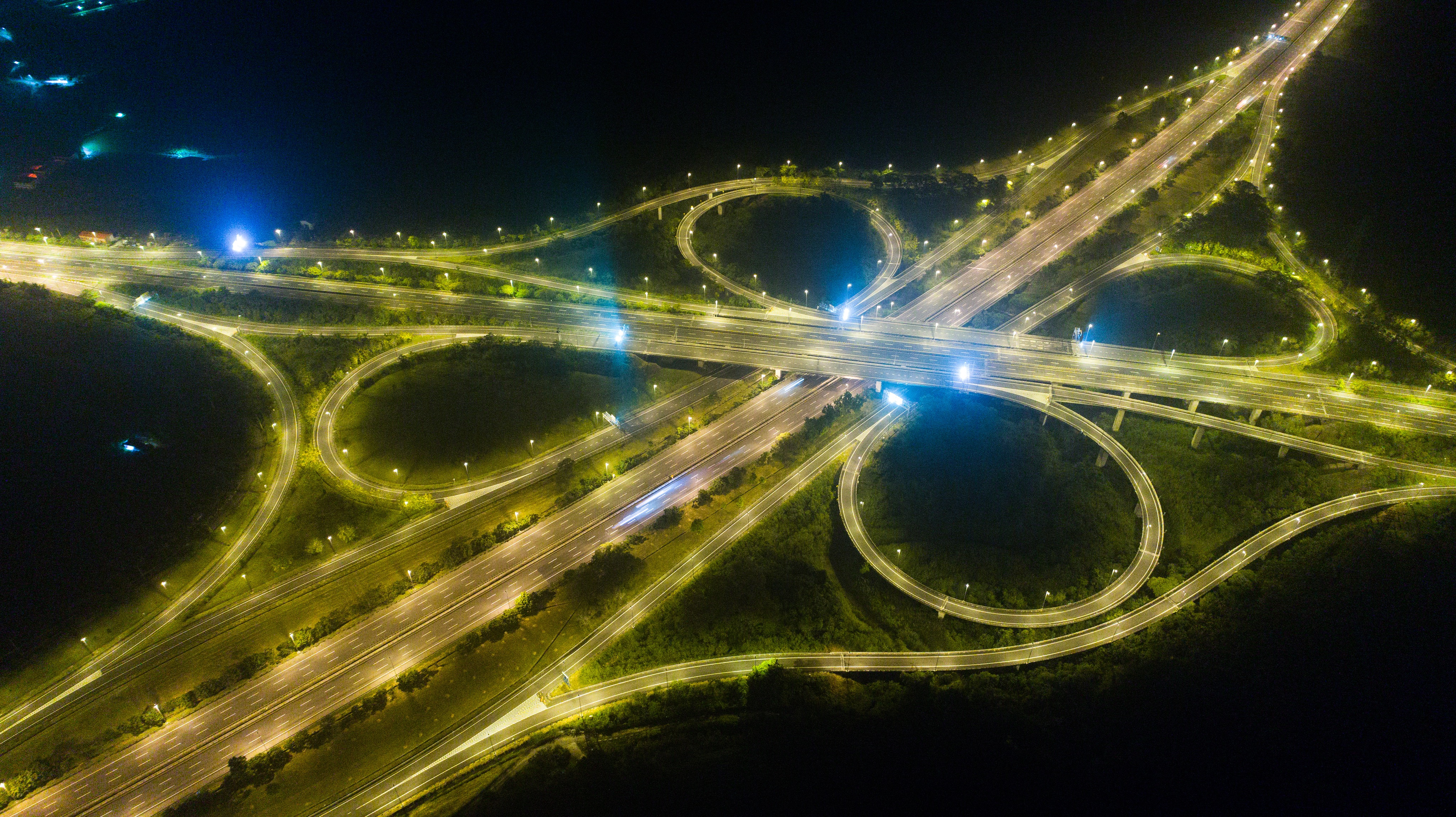 半夜的官田系統交流道